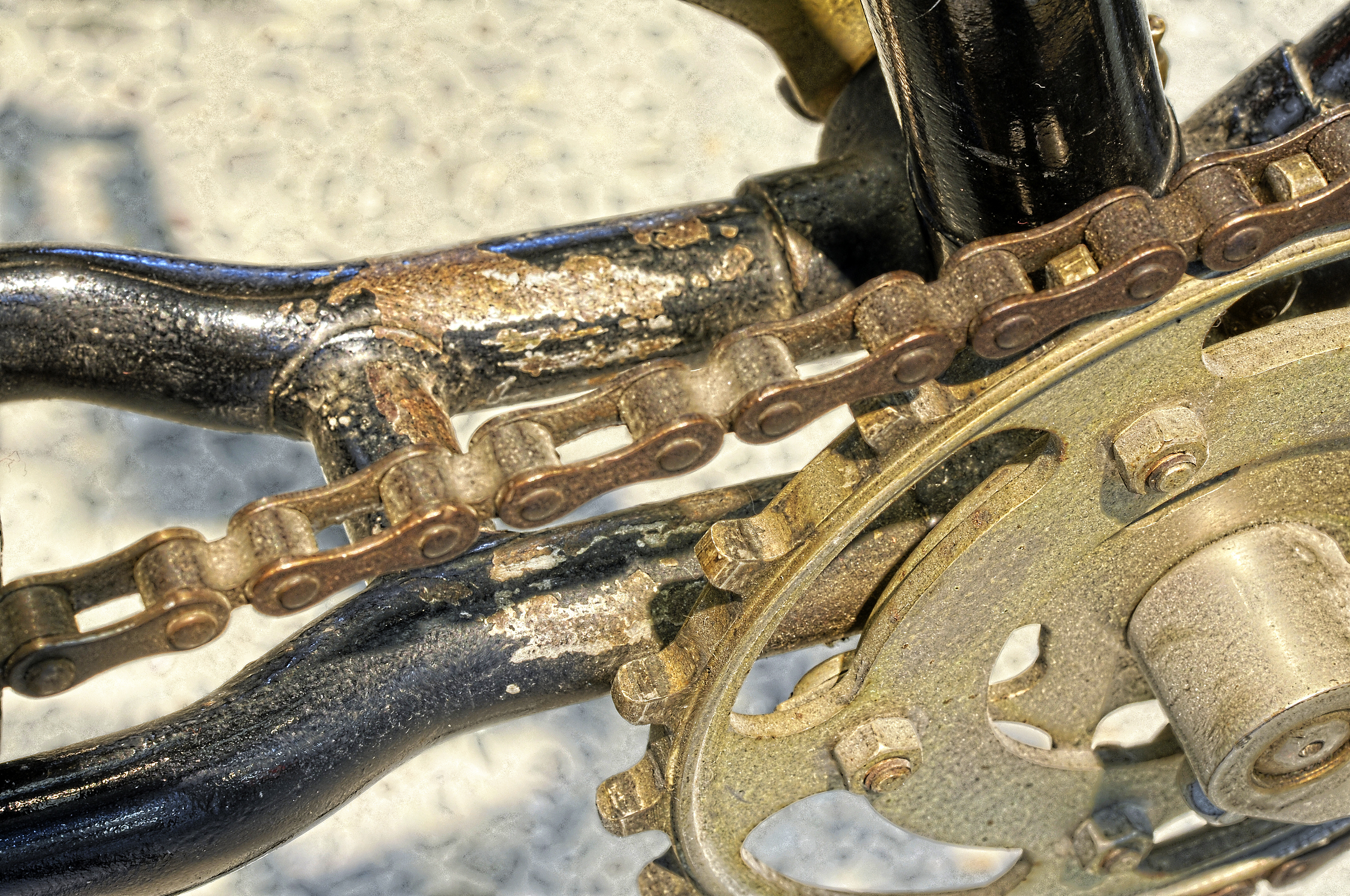 Fototermin Škoda Museum Mladá Boleslav 2013 Fototermin Škoda Muzeum 5. April 2013 in Mladá Boleslav This work is free and may be used by anyone for any purpose. If you wish to use this content, you do not need to request permission as long as you follow any licensing requirements mentioned on this page.